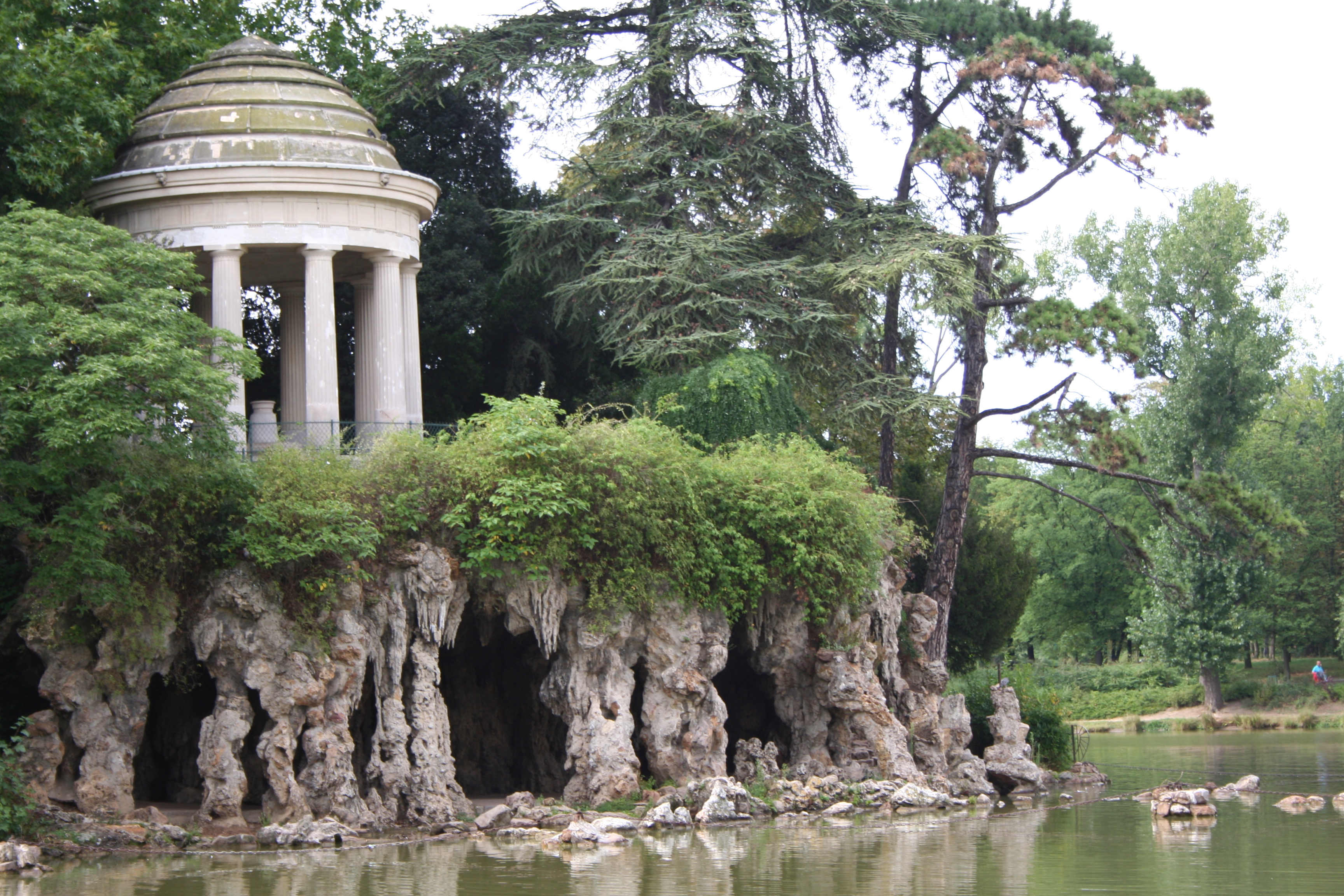 Bois de Vincennes, Paris, France.